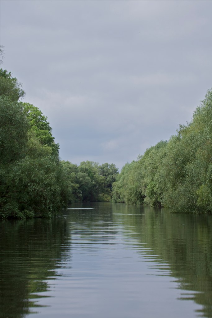 Danube Delta